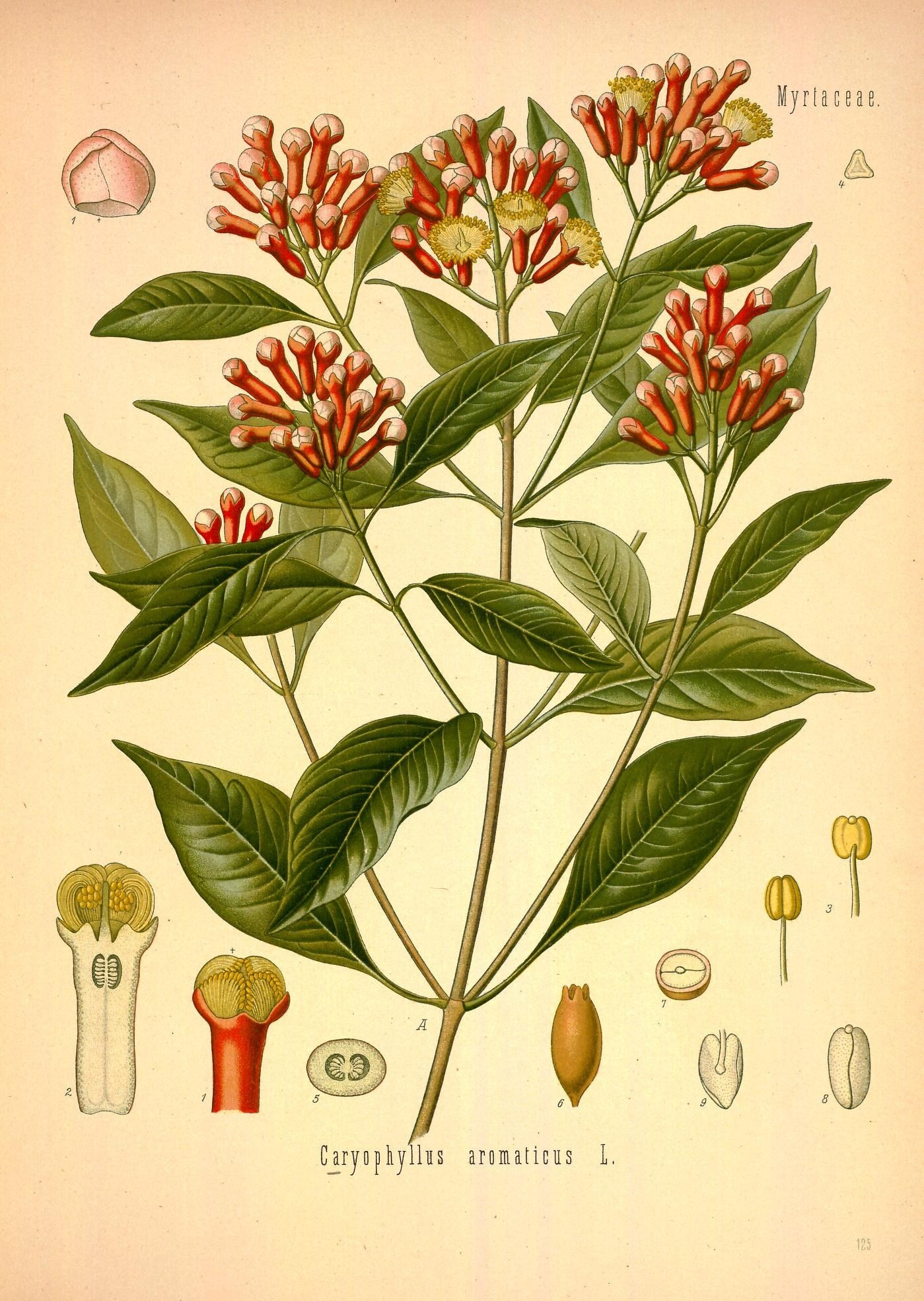 Gewürznelkenbaum. A Blüthenzweig, natürl. Grösse; 1 Blüthenknospe, während des Aufblühens, mit abgehobenen Blumenblättern (links oben), vergrössert; 2 Blüthenknospe im Längsschnitt, desgl.; 3 Staubgefässe von verschiedenen Seiten, desgl.; 4 Pollen, desgl.; 5 Fruchtknoten im Querschnitt, desgl.; 6 Frucht, natürl. Grösse; 7 dieselbe im Querschnitt, mit Würzelchen und Samenlappen, desgl.; 8 Embryo, desgl.; 9 Ein Samenlappen mit Würzelchen, desgl.